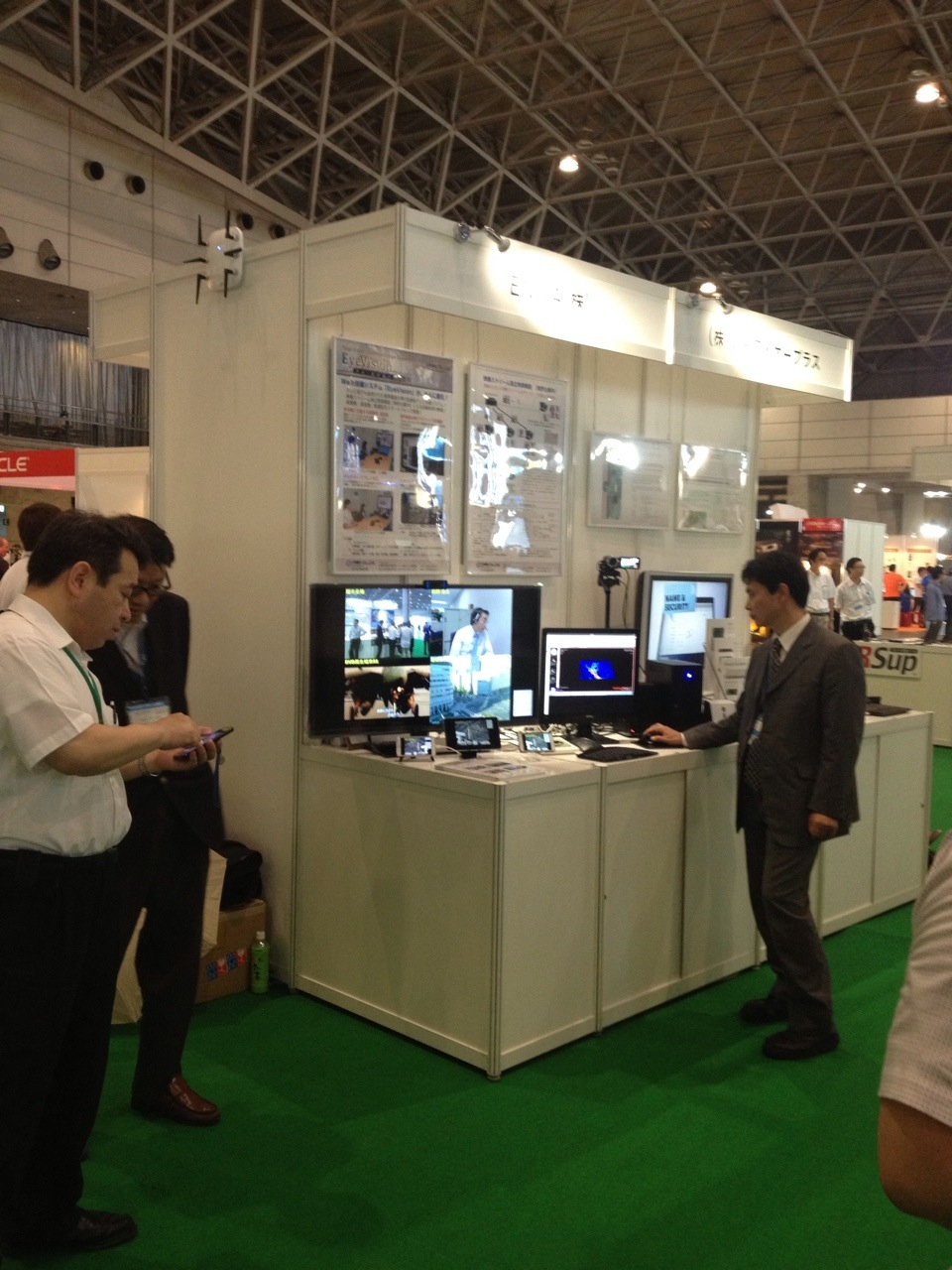 ENWA Company, Limited Exhibition 1